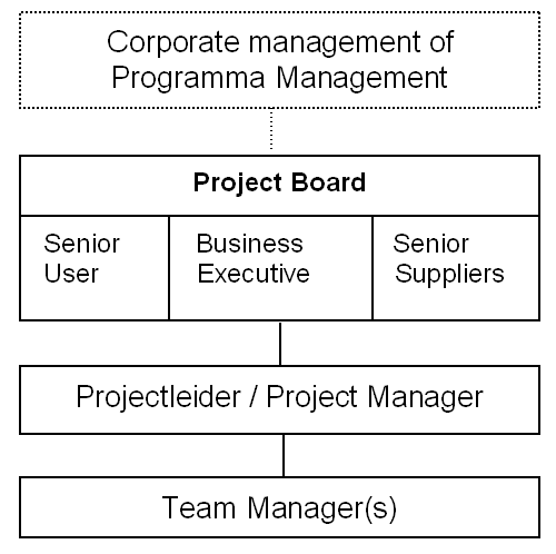 Zelf gemaakte media. Figuur geeft structuur van een Project Management Team (PMT) conform Prince2 benamingen. De Projectassurance kan nog worden toegevoegd - voor grote projecten - aan de Project Board. Project Support (een aparte organisatie) kan worden ingesteld om de Project Manager (bij kleine projecten vaak Projectleider genoemd) te ondersteunen. Het corporate management maakt géén deel uit van het PMT. Het is wél een essentieel onderdeel van de besluitvorming, omdat doelstellingen van het PMT ten opzichte van andere projecten/PMT's en de strategie van het bedrijf moeten worden geoptimaliseerd.